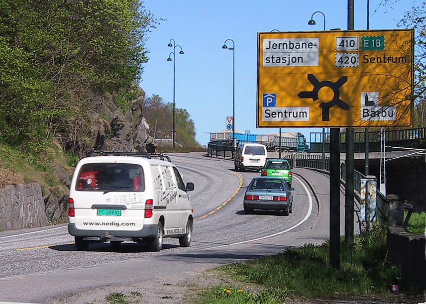 Møllebakken i bydelen Barbu i Arendal. Mølleheia til venstre, mens Nedre mølle lå utenfor bildekanten til høyre.